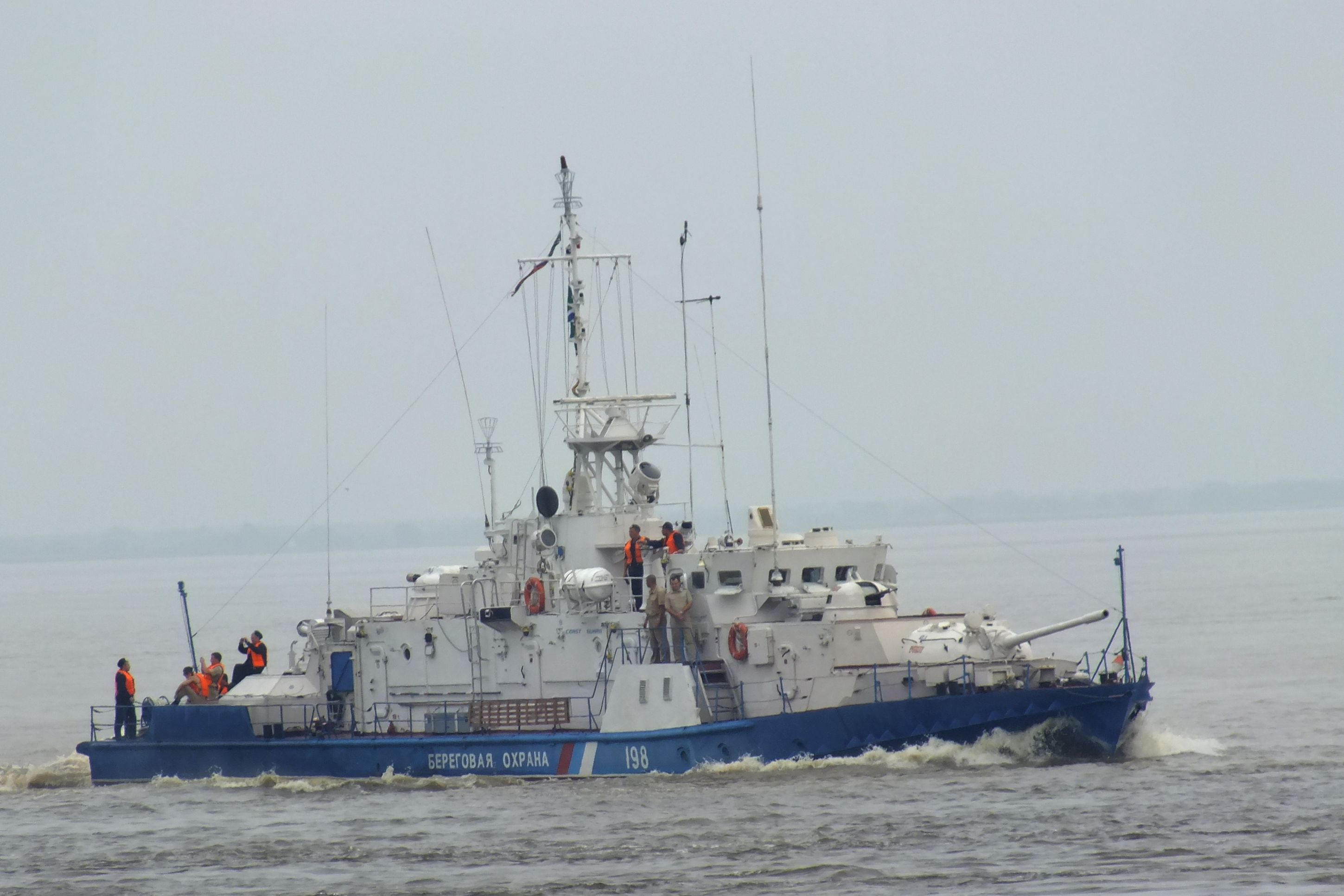 Vasiliy Poyarkov (ship, 1991)